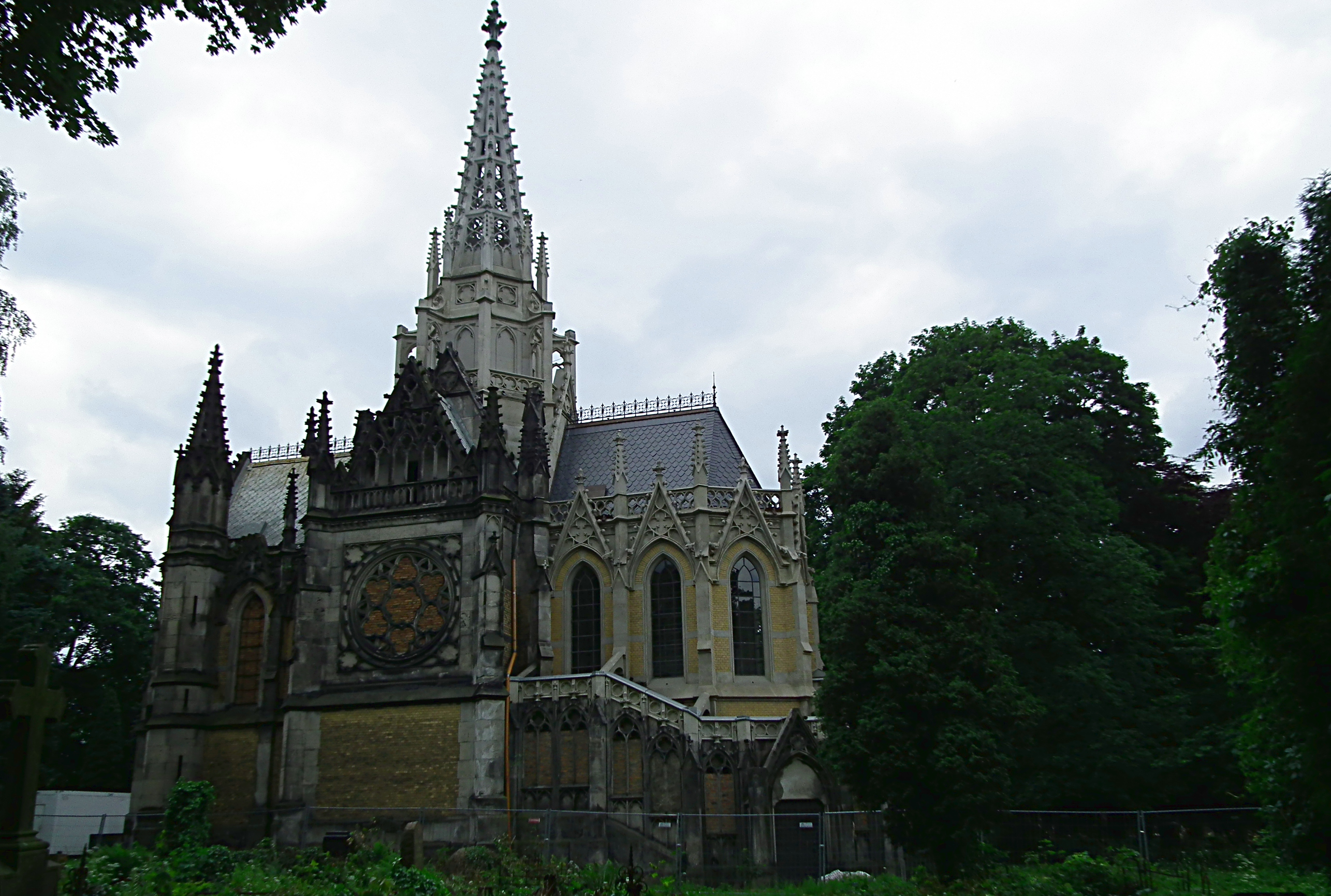 Cmentarz Stary, ul. Ogrodowa 43